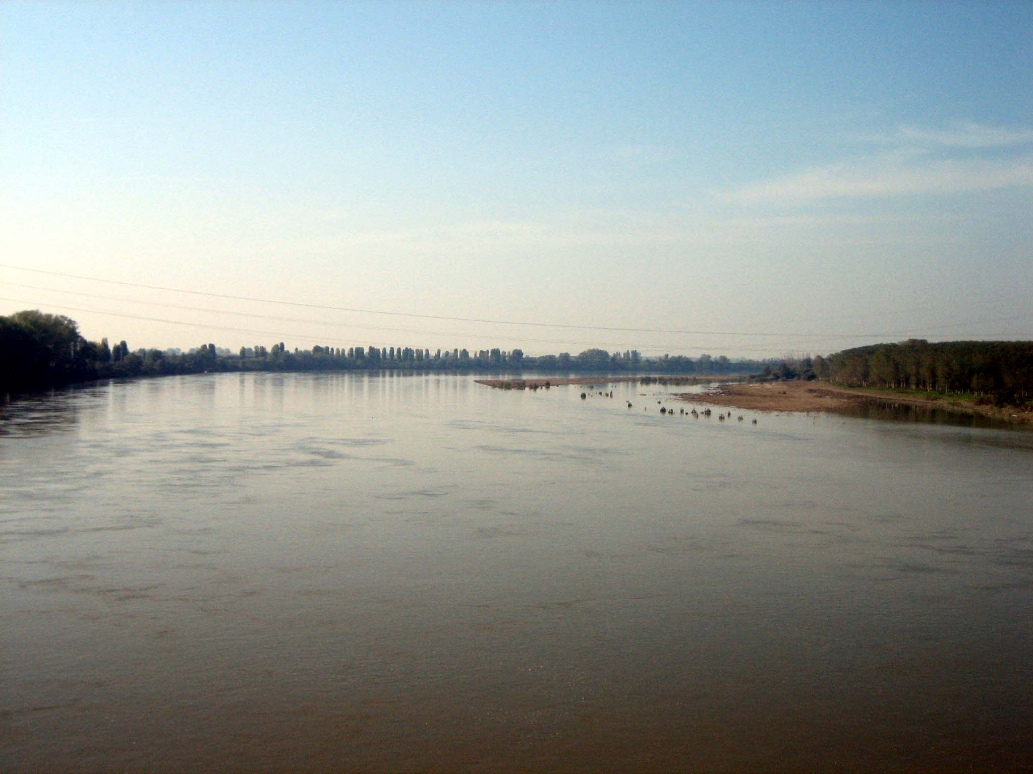 Der Po südlich von Mantova